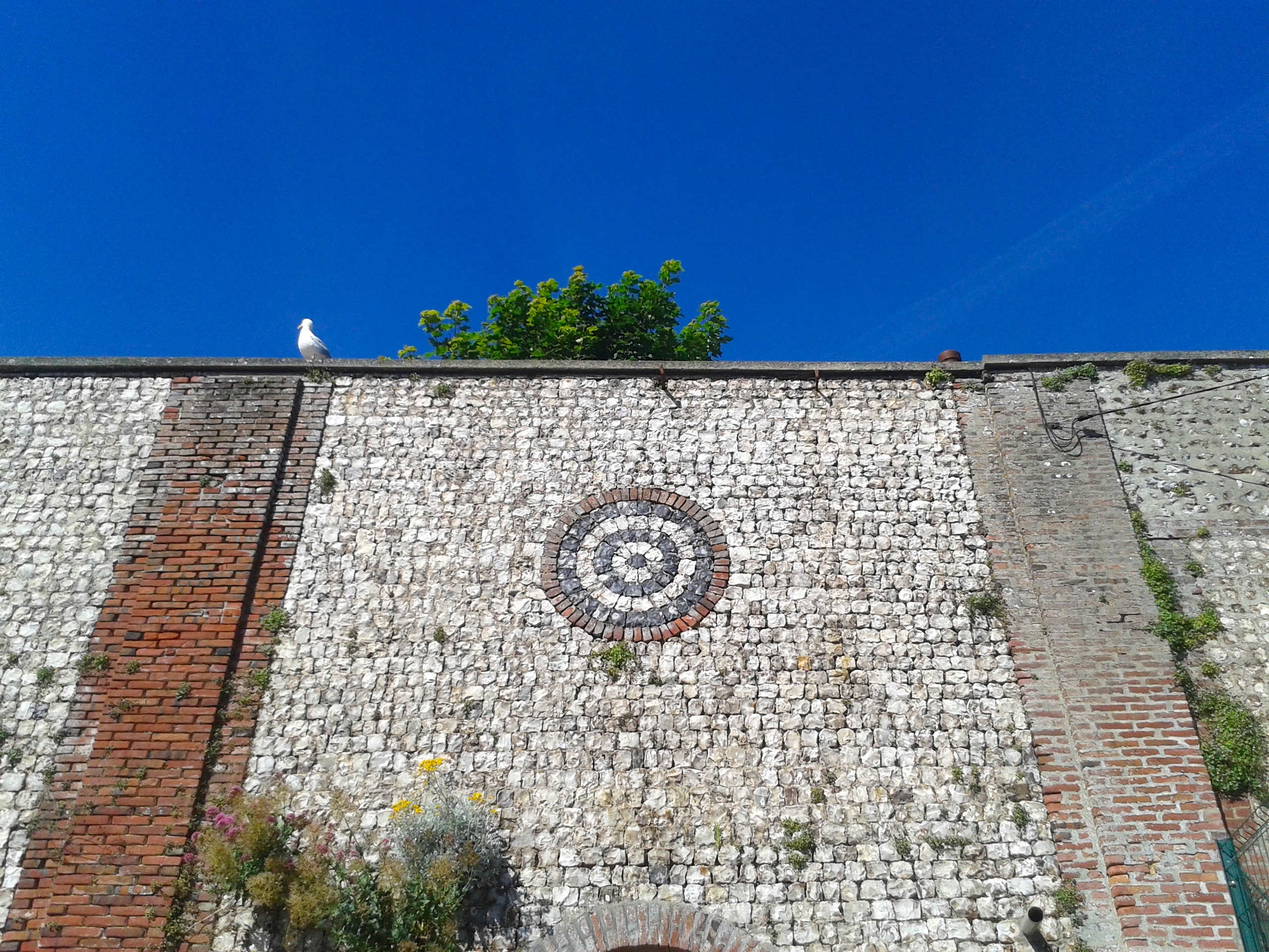 Reste des murs d'enceinte de la Villa les Roches à Etretat